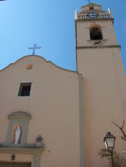 Iglesia parroquial de Otos, Comunidad Valenciana, España. Está dedicada a la Purísima Concepción y se edificó en la primera mitad del siglo XVIII.